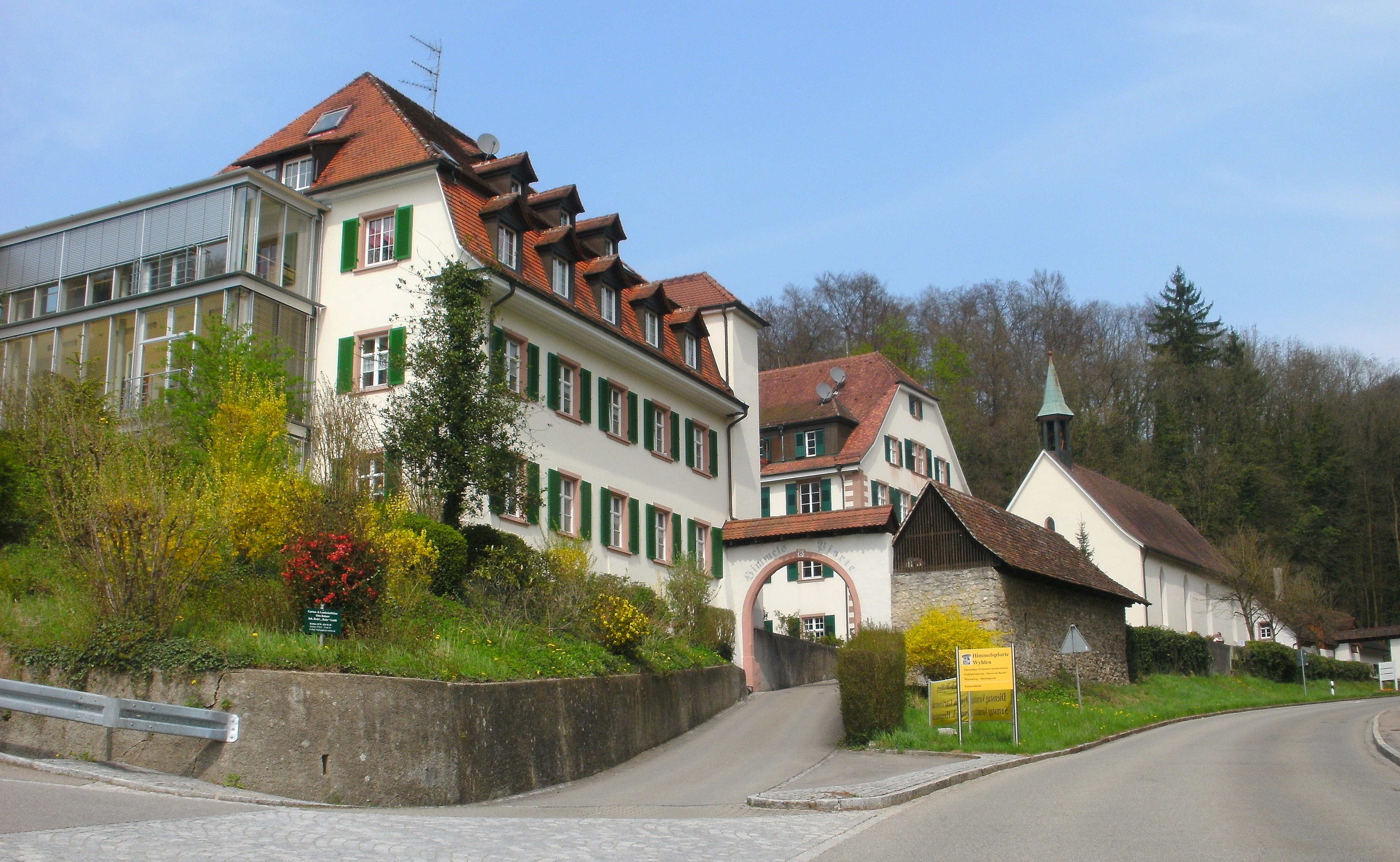 Ehemaliges Prämonstratenser-Kloster Himmelspforte in Grenzach-Wyhlen, Teilort Wyhlen. Gesamtansicht von der Straße auf den Rührberg.